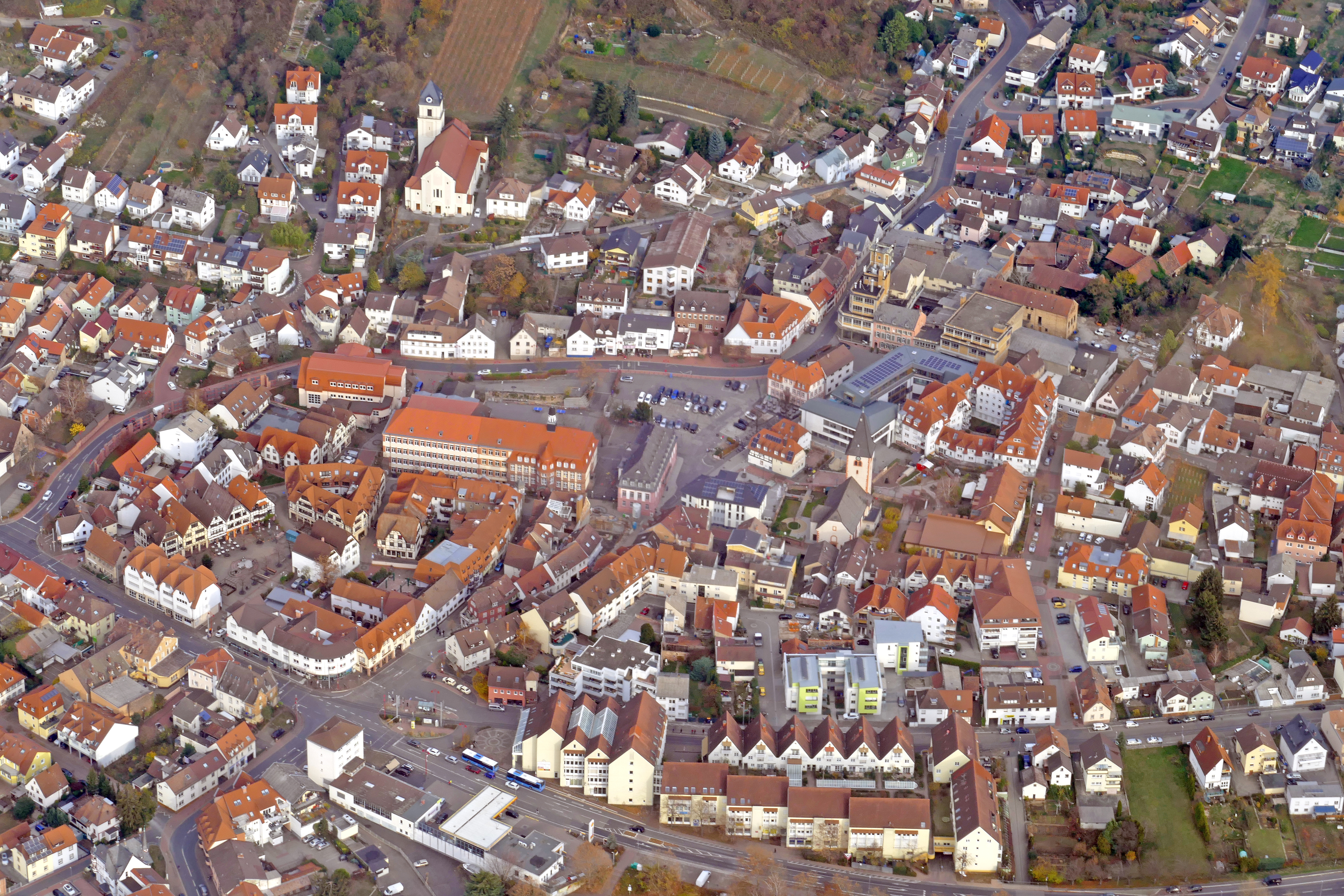 Das Ortszentrum von Leimen vom Tragschrauber aus fotografiert.